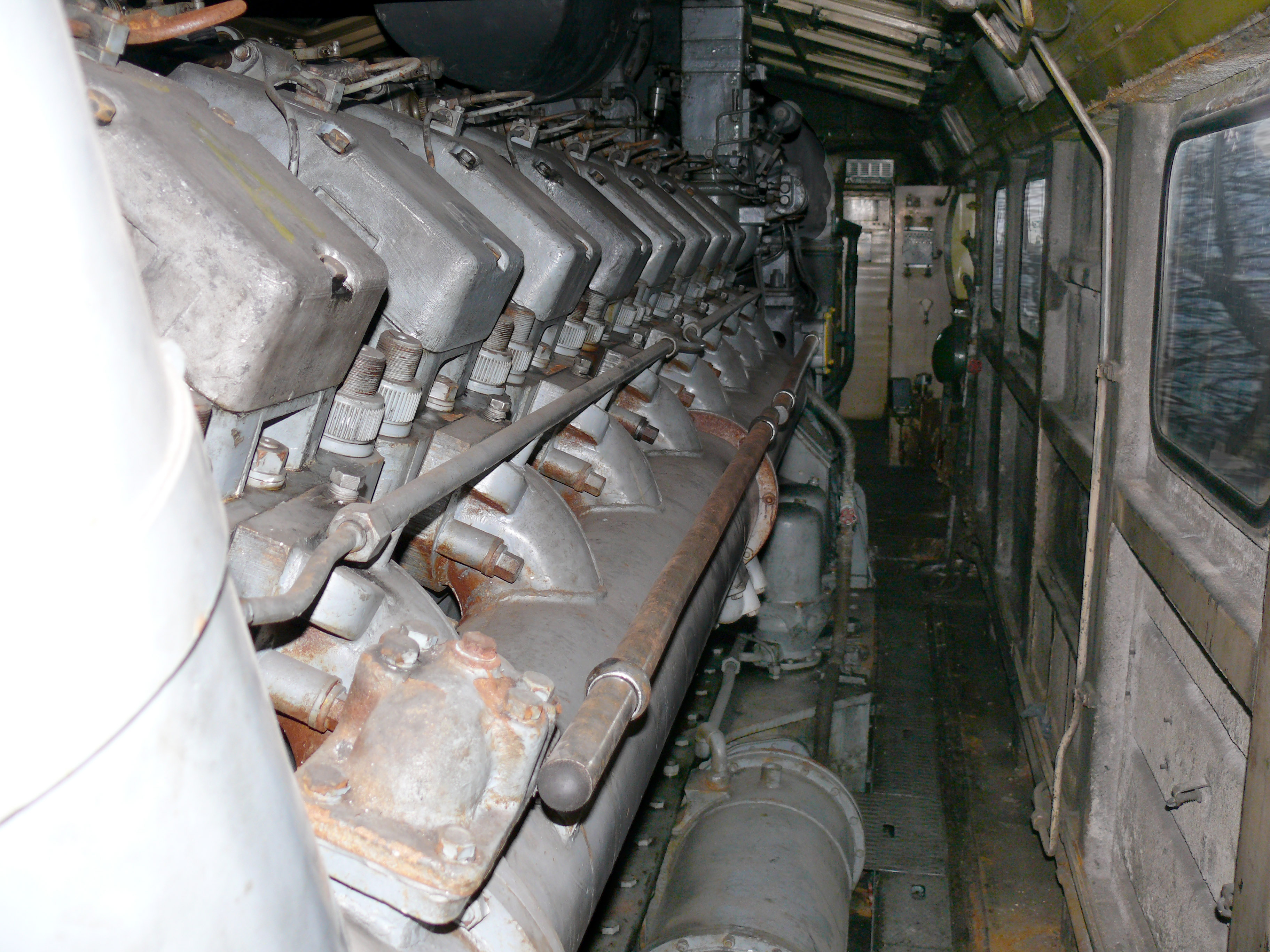 Dieselmotor 5D49 vom Führerstand 2 aus gesehen. Blick auf Zylinderseite A8 - A1.